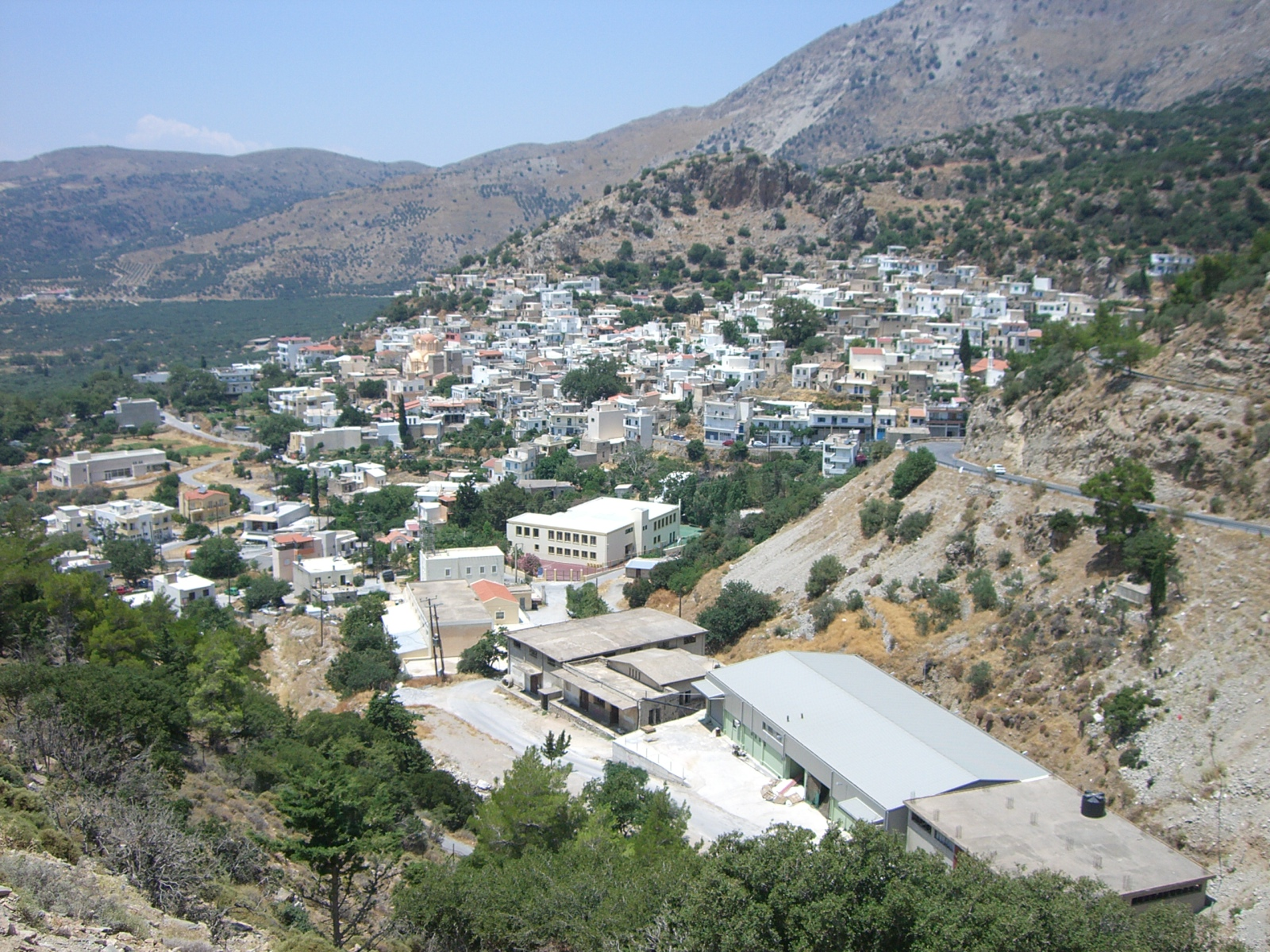 Ano Vianos, Kreta